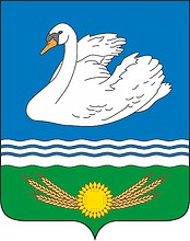 Герб Раздольненского района. Утвержден Решением Раздольненского районного Совета от 24 января 2017 года № 633-1/17